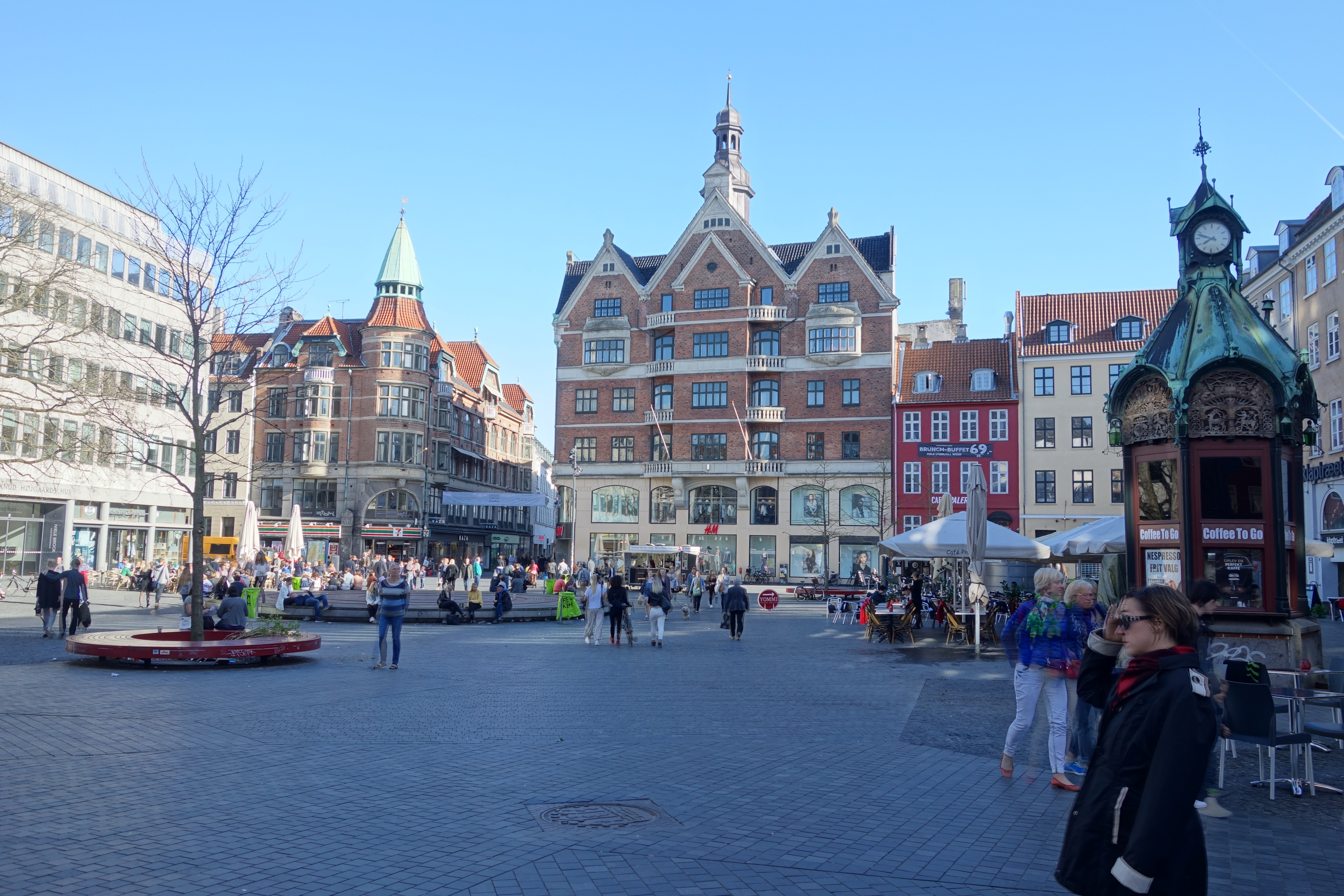 Kultorvet in Copenhagen, Denmark